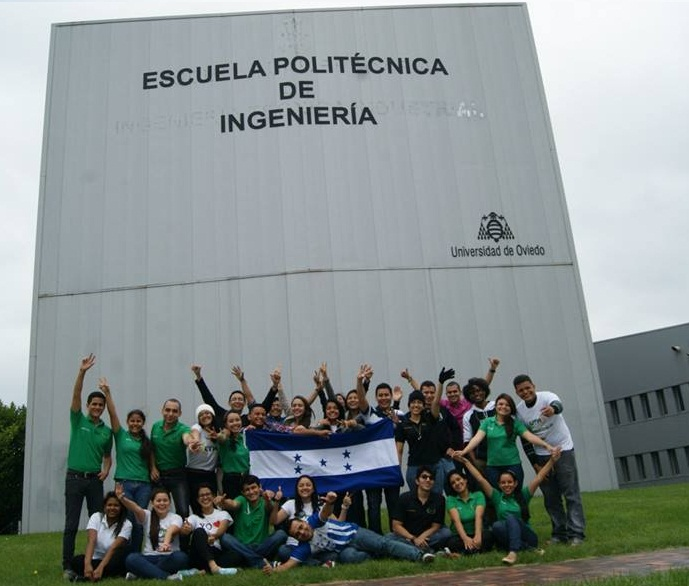 Estudiantes Erasmus 2015-2016